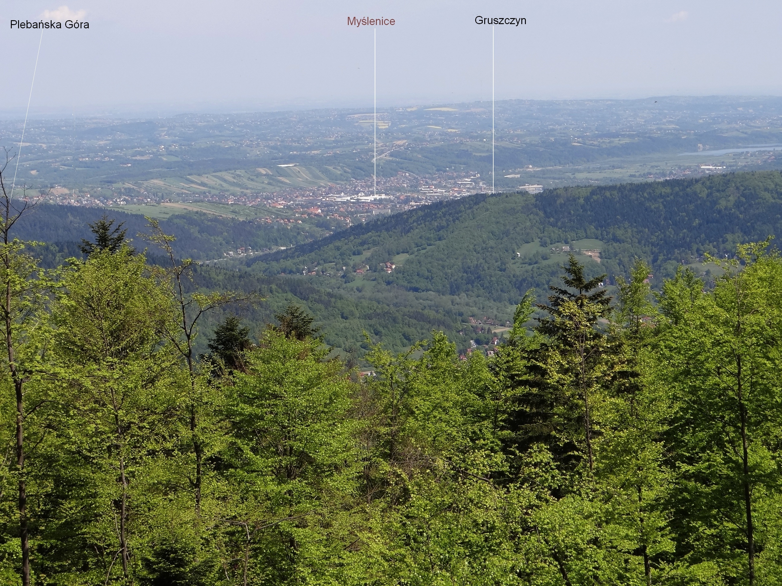 Widok z Kotonia w Beskidzie Makowskim